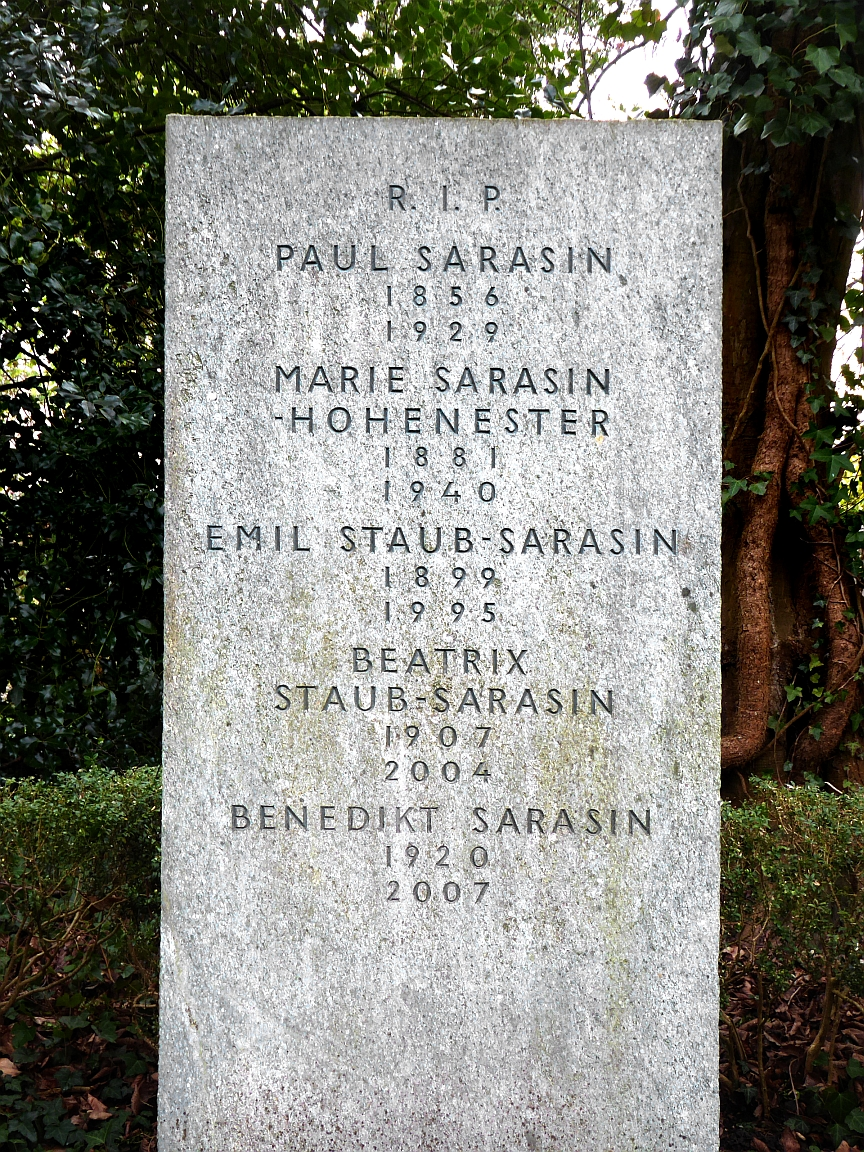 Paul Sarasin-Hohenester (1856–1929), Dr.phil., Naturforscher, Forschungsreisender, vielseitiger Autor. Dr. h.c. der Univ. Basel und Lausanne, Familiengrab auf dem Friedhof Hörnli, Riehen, Basel-Stadt